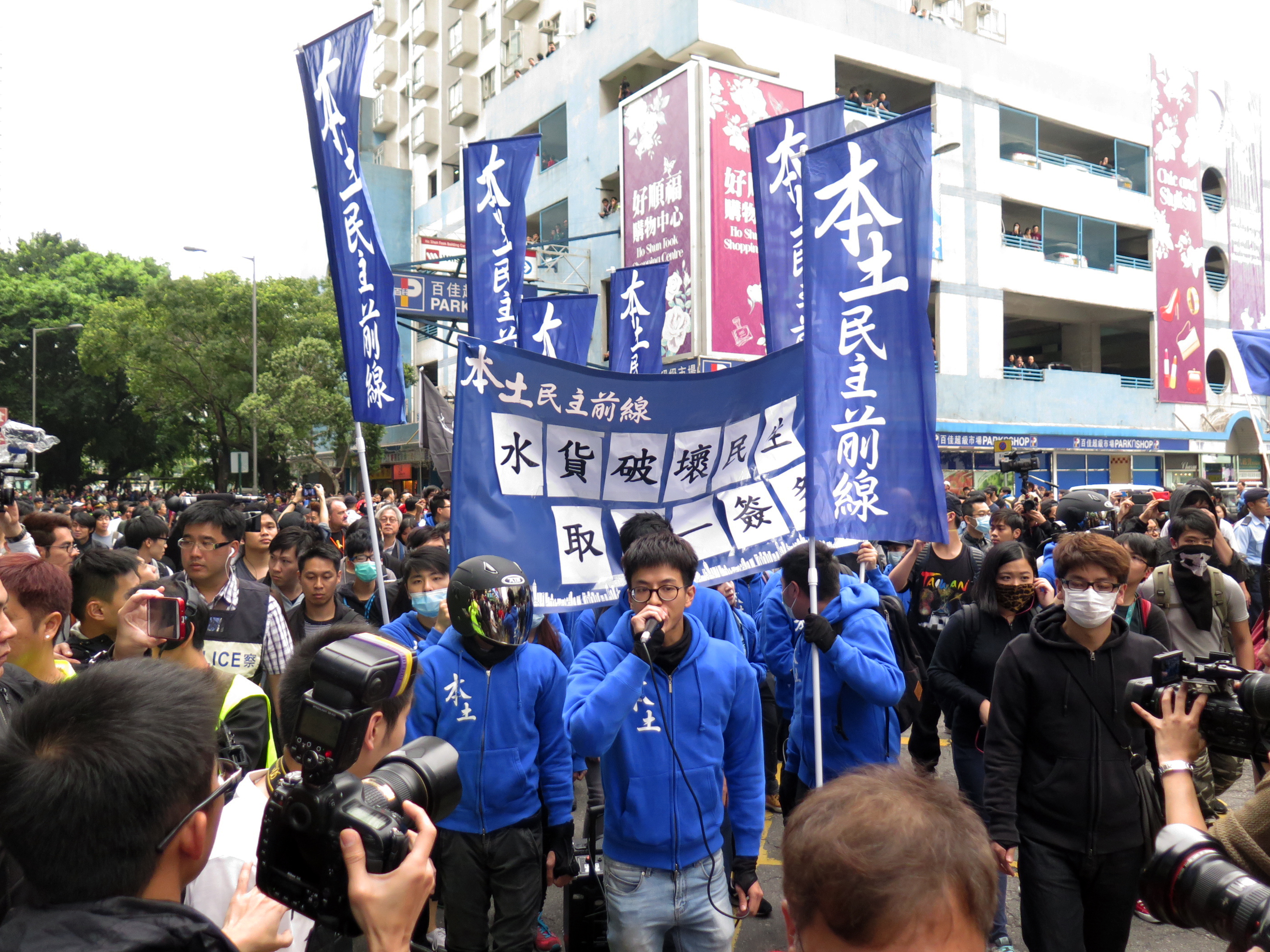 HK Indigenous walk to Sau Fu Street